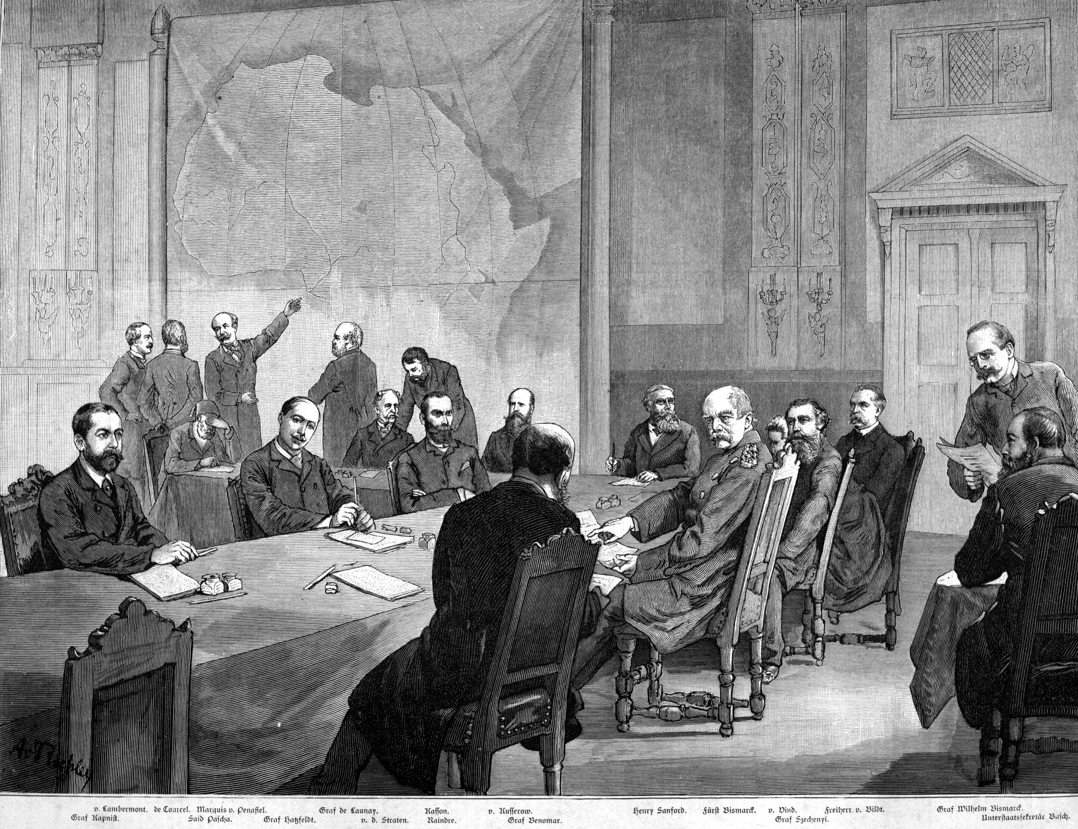 Zeichnung der Teilnehmer der Kongokonferenz 1884